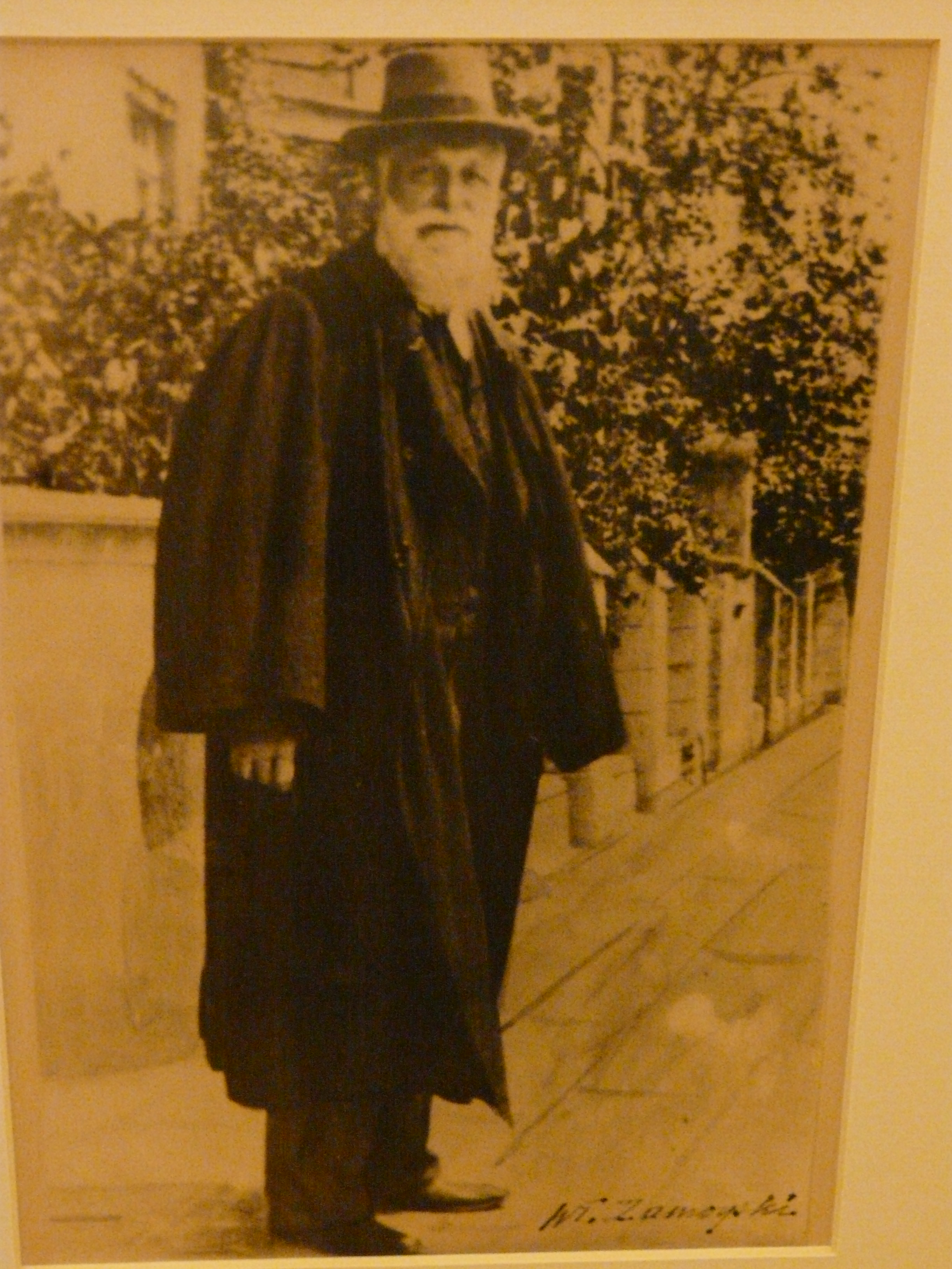 Zakopane. Zespół dworsko-parkowy w Kuźnicach, okolice i wnętrza.